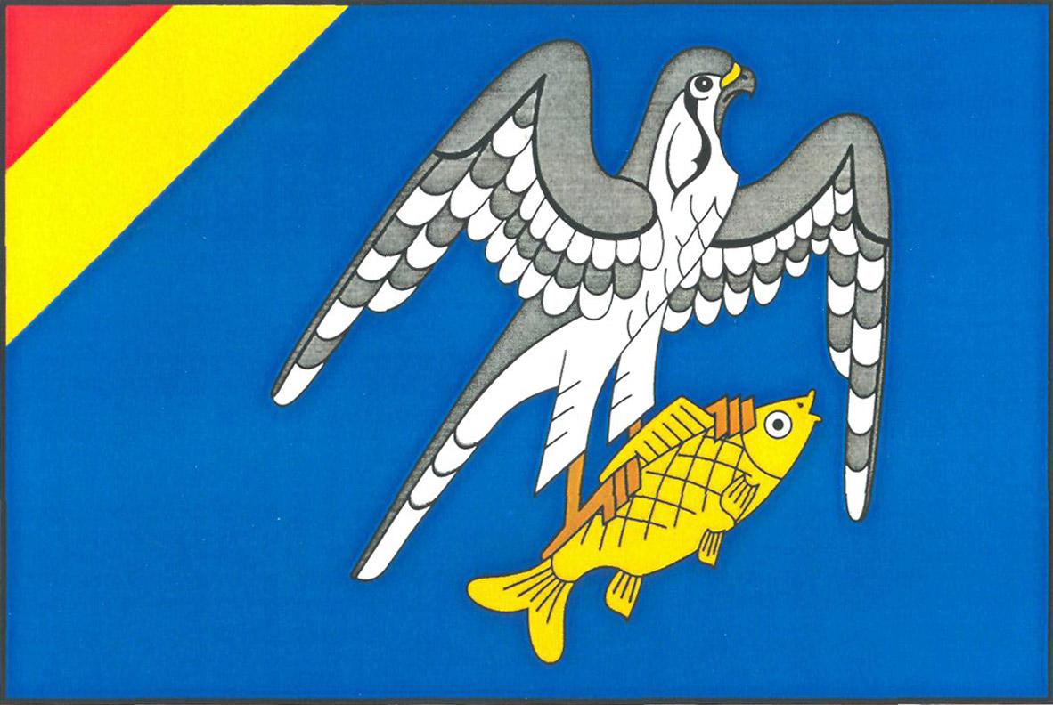 Vlajka obce Břežany II